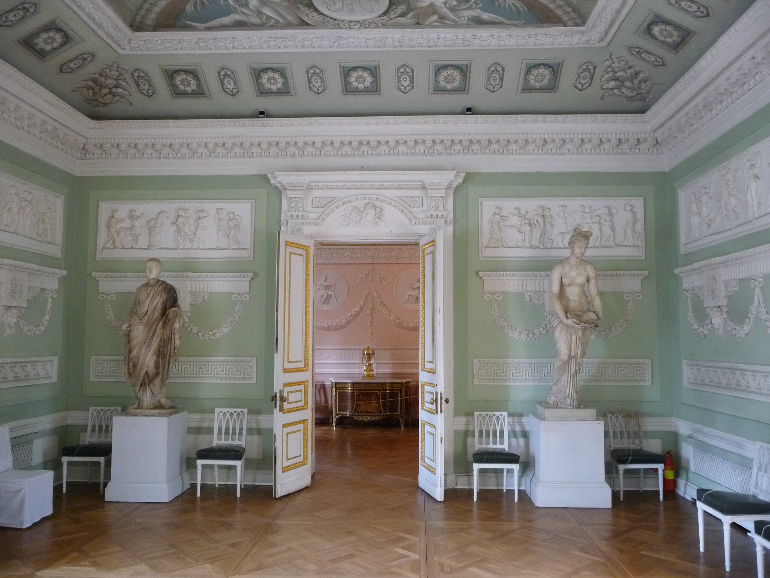 Palace-p1030781.jpg